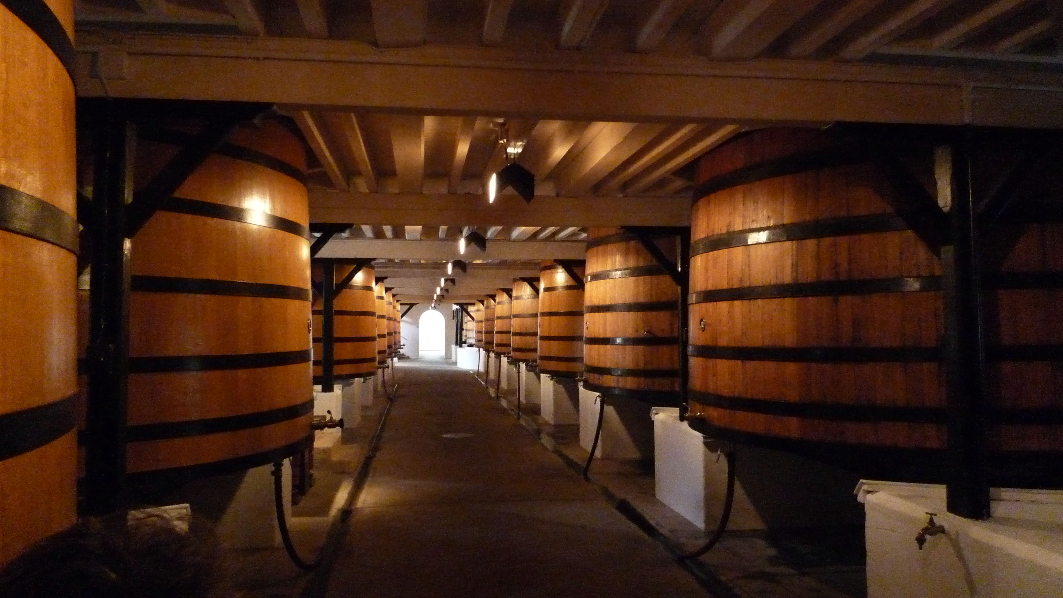 Château Mouton Rothschild - Eichenfässer im Gärkeller